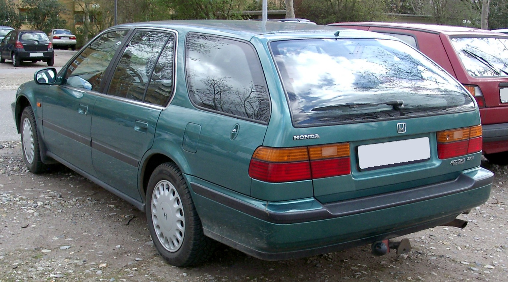 Honda Accord Kombi, 4. Generation